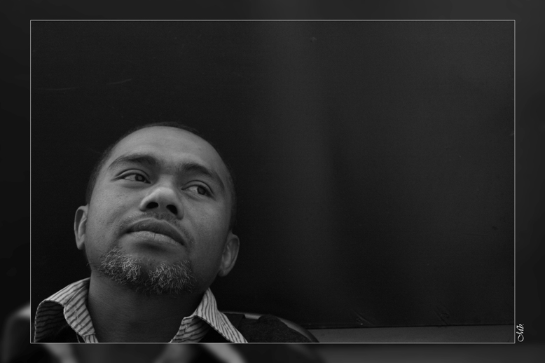 SILO, Artiste de Madagascar